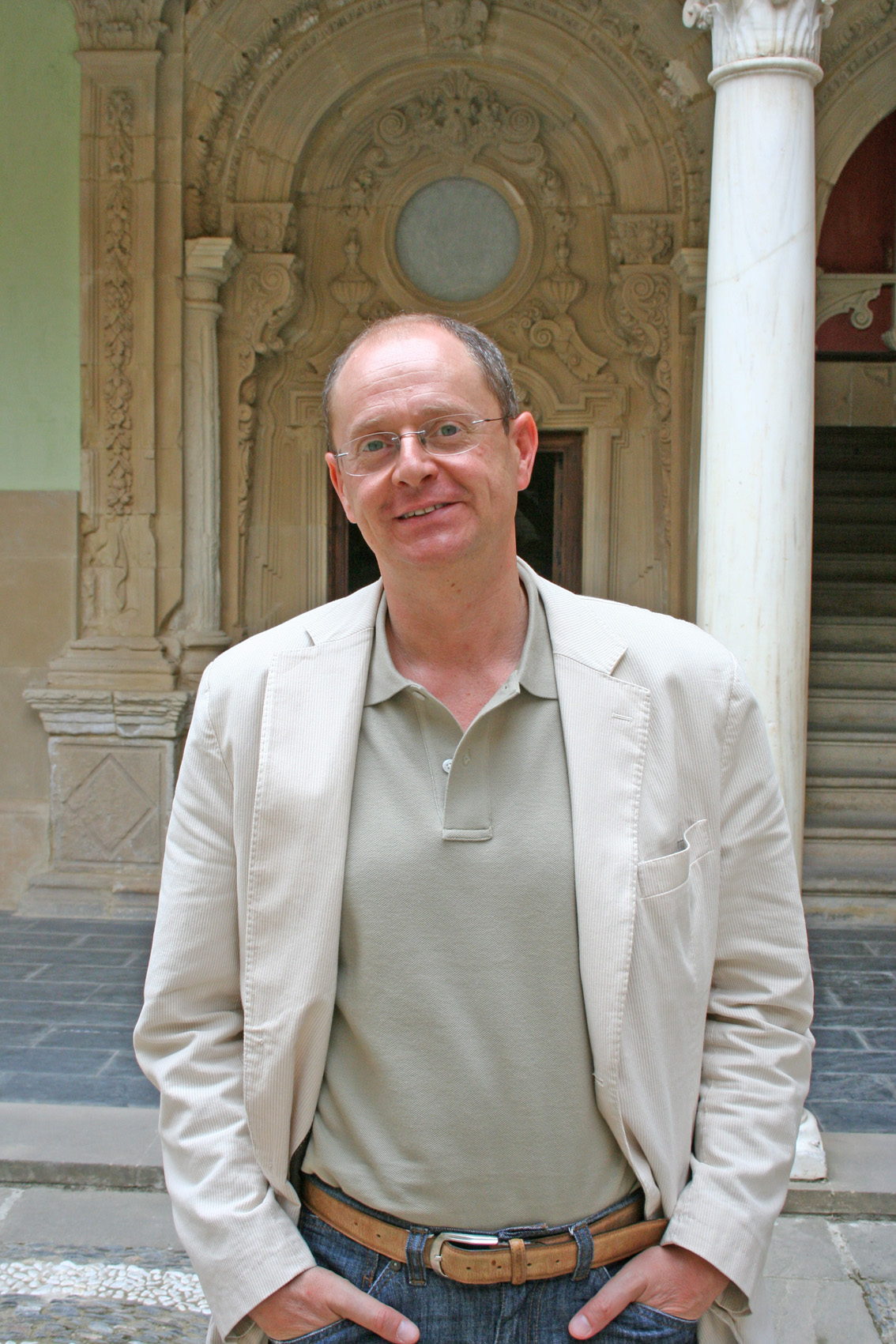 El escritor de "La luz prodigiosa". Ofreció una conferencia en el curso "Literatura y otras realidades", en los cursos de verano 2007 de la Universidad Internacional de Andalucía.